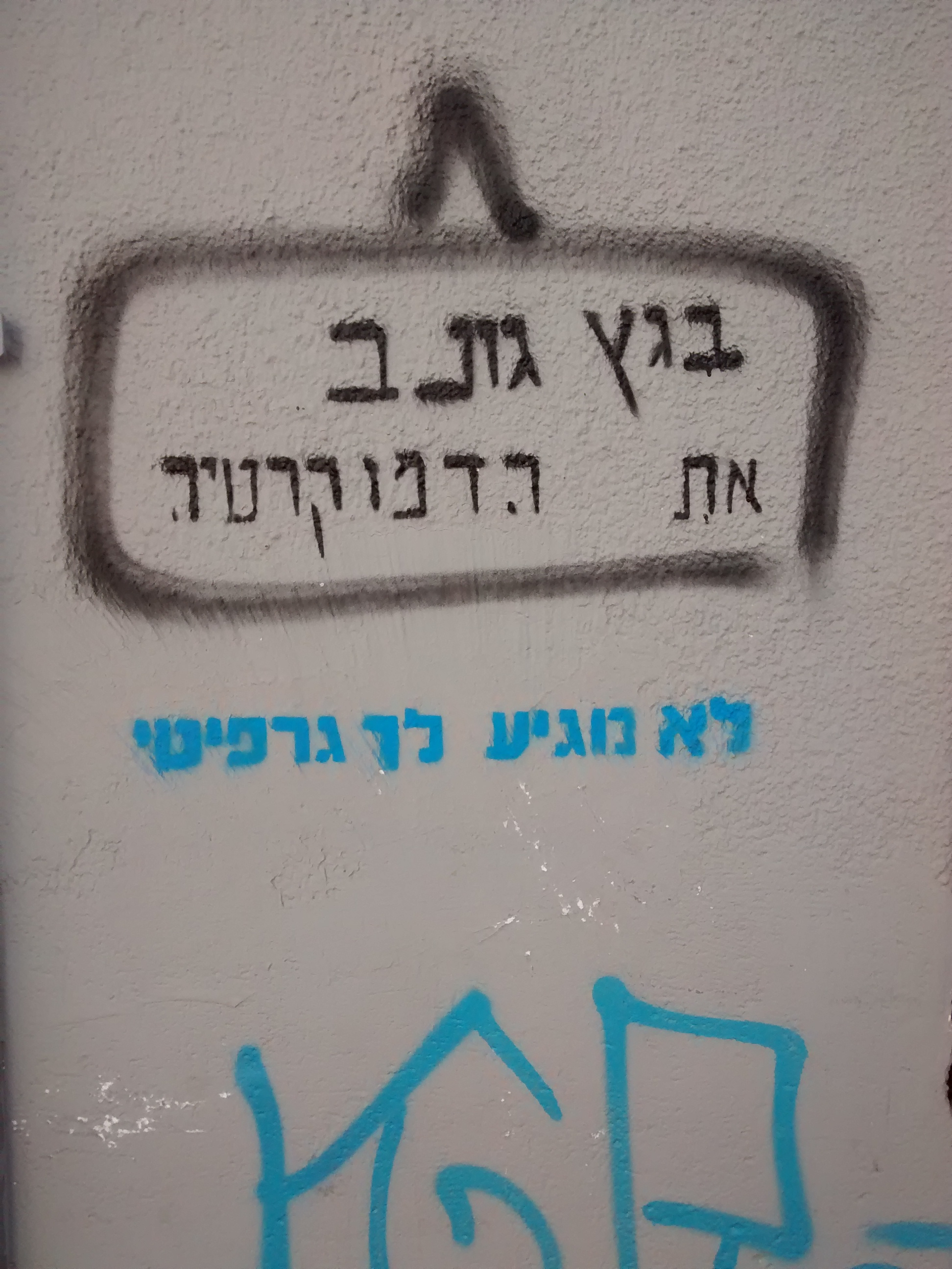 פלורנטין היא שכונה בדרום תל אביב, הסמוכה לגבול עם יפו, אשר נקראת על שמו של שלמה פלורנטין. השכונה ממוקמת בין הרחובות העלייה במזרח, אליפלט במערב, דרך יפו מצפון ודרך שלמה (סלמה) מדרום.